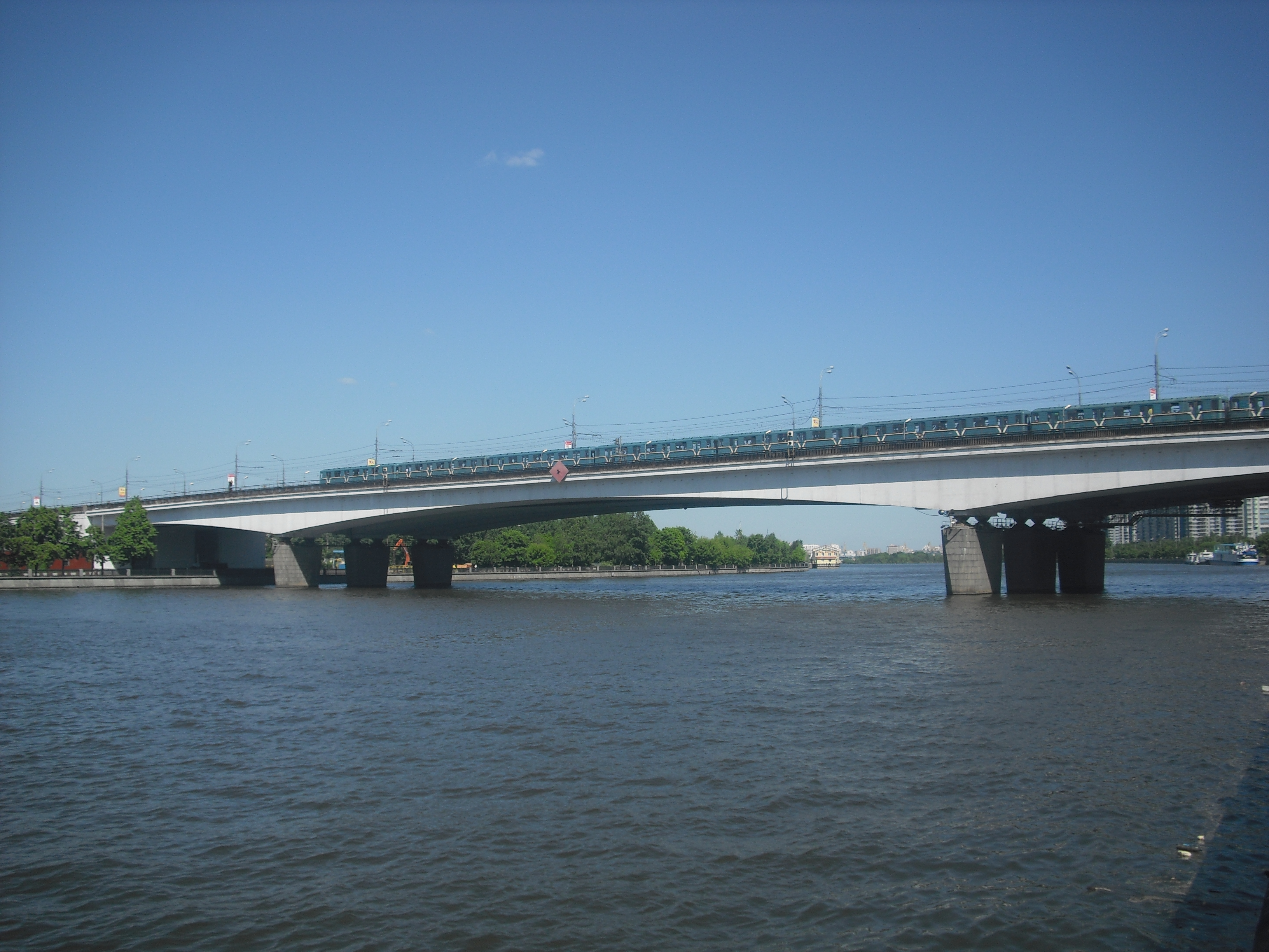 Нагатинский метромост в Москве